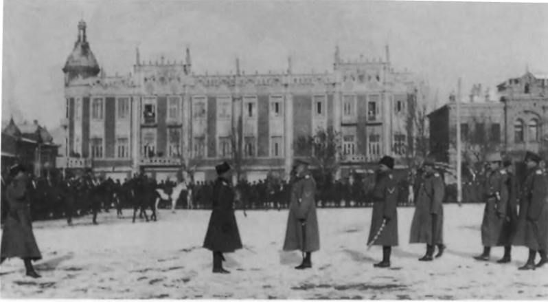 Белый генерал Антон Иванович Деникин принимает парад корниловских частей в Екатеринодаре, 1918 год.